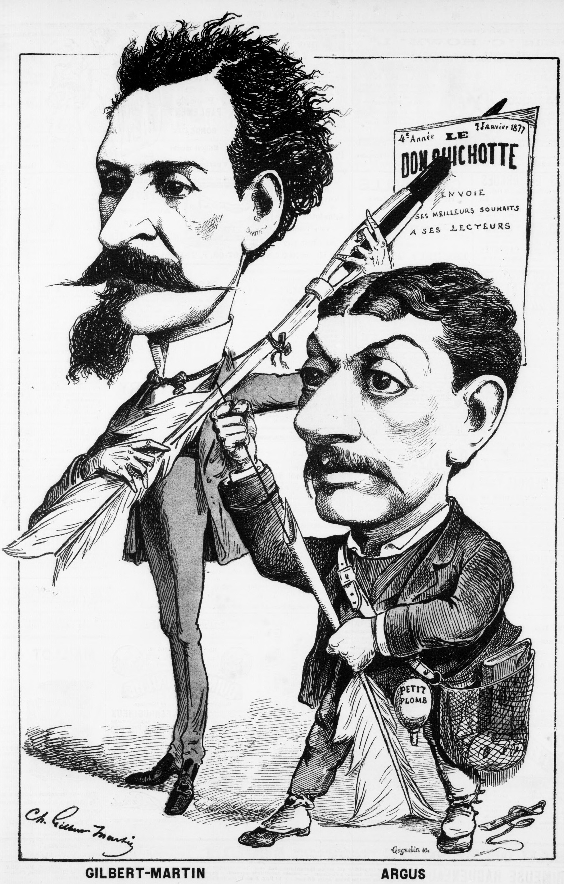 Charles Gilbert-Martin et Argus (Ernest Toulouze).